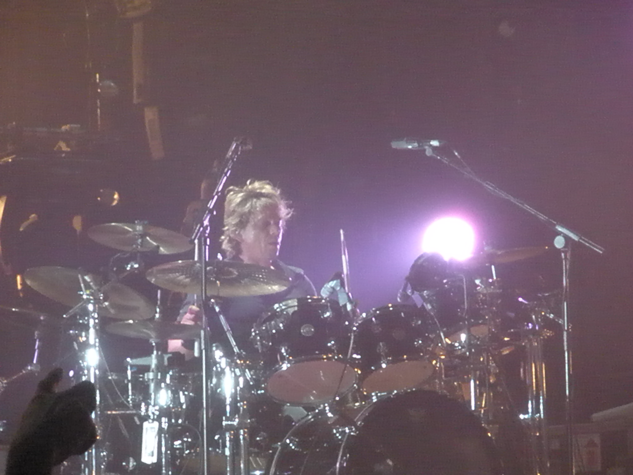 Emiliàn e rumagnòl: Jason Cooper di Cure tòlt śò dal viṿ in dal Śugn dal 2008